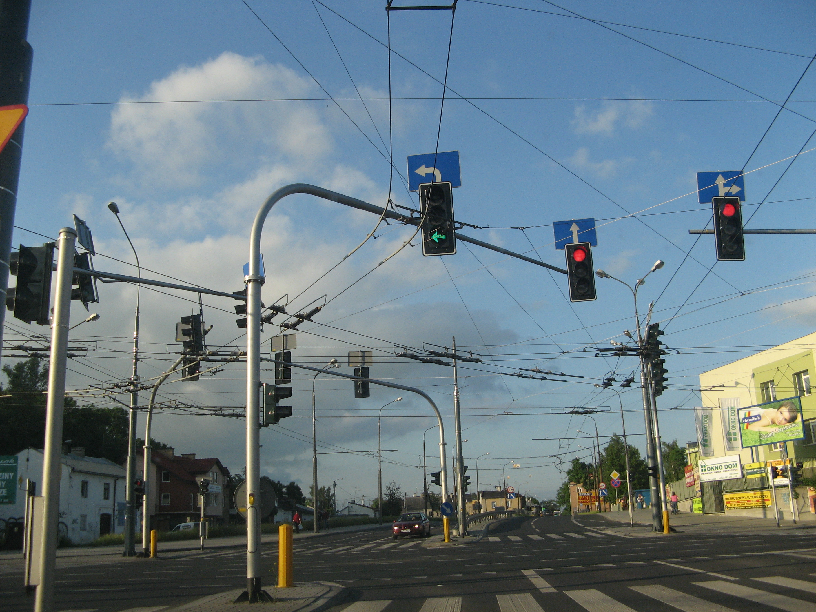 Lublin — trolejbusowa sieć trakcyjna.